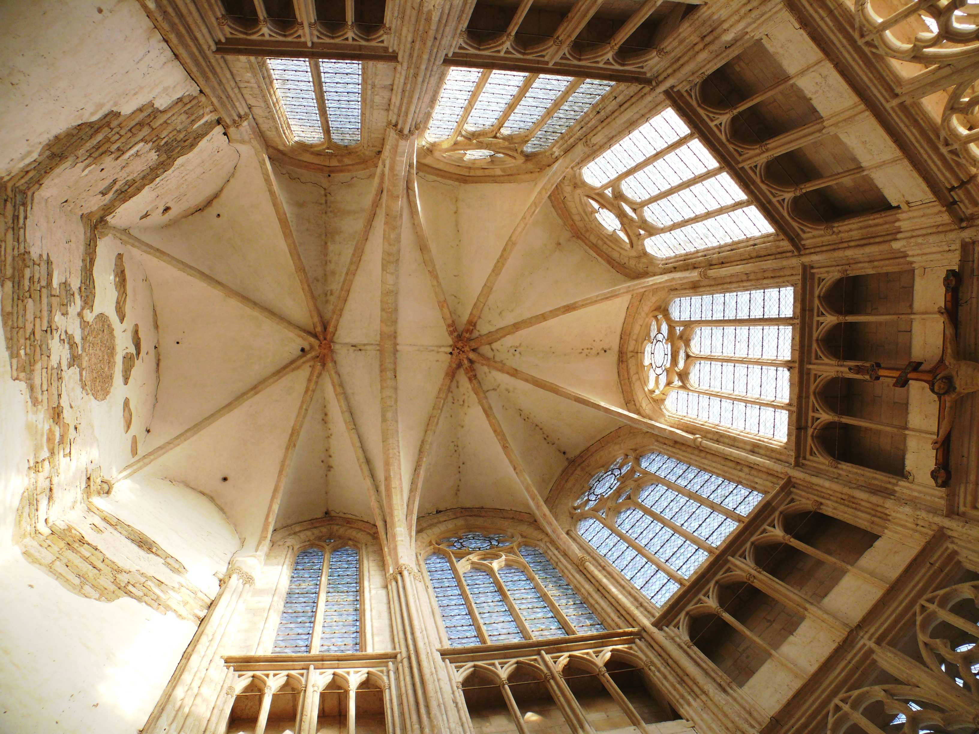 Prieuré Saint-Thibault - Voûte du choeur